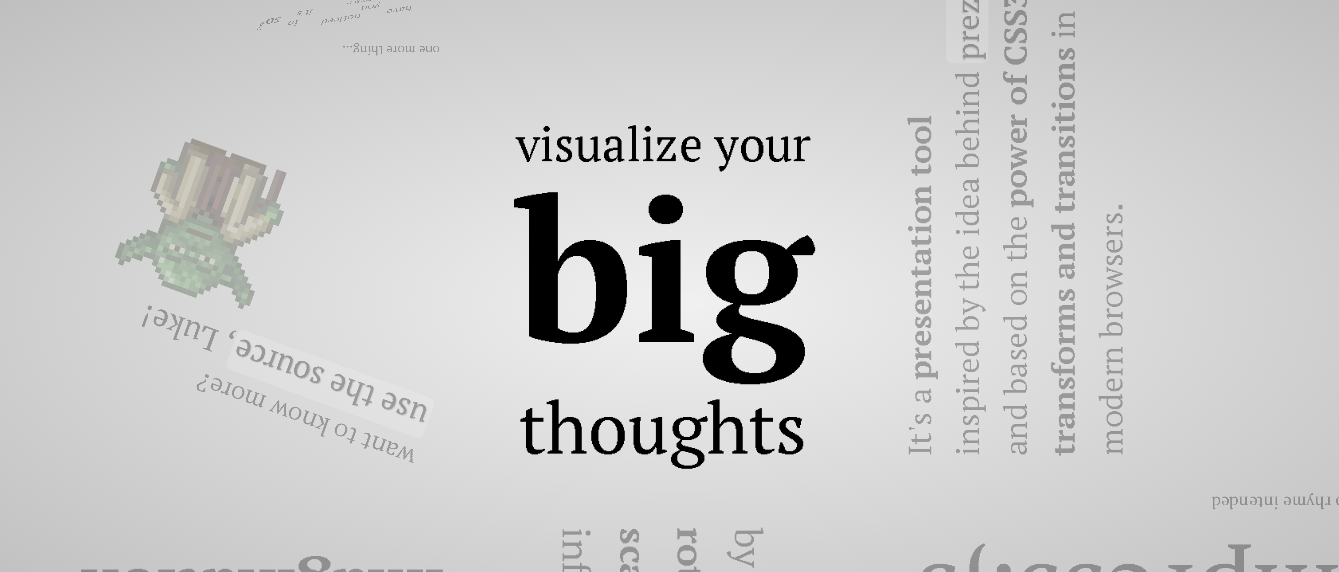 Impressjs